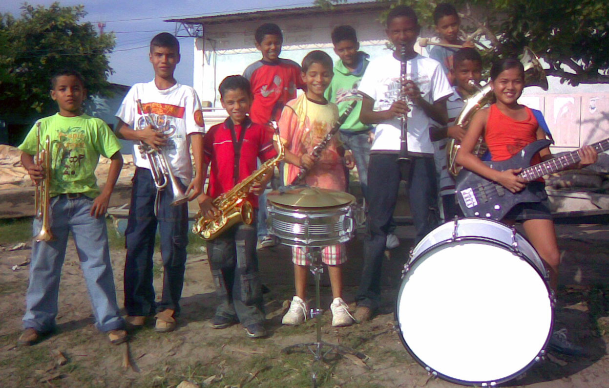 Banda La Gloria en el municipio de La Gloria - Cesar